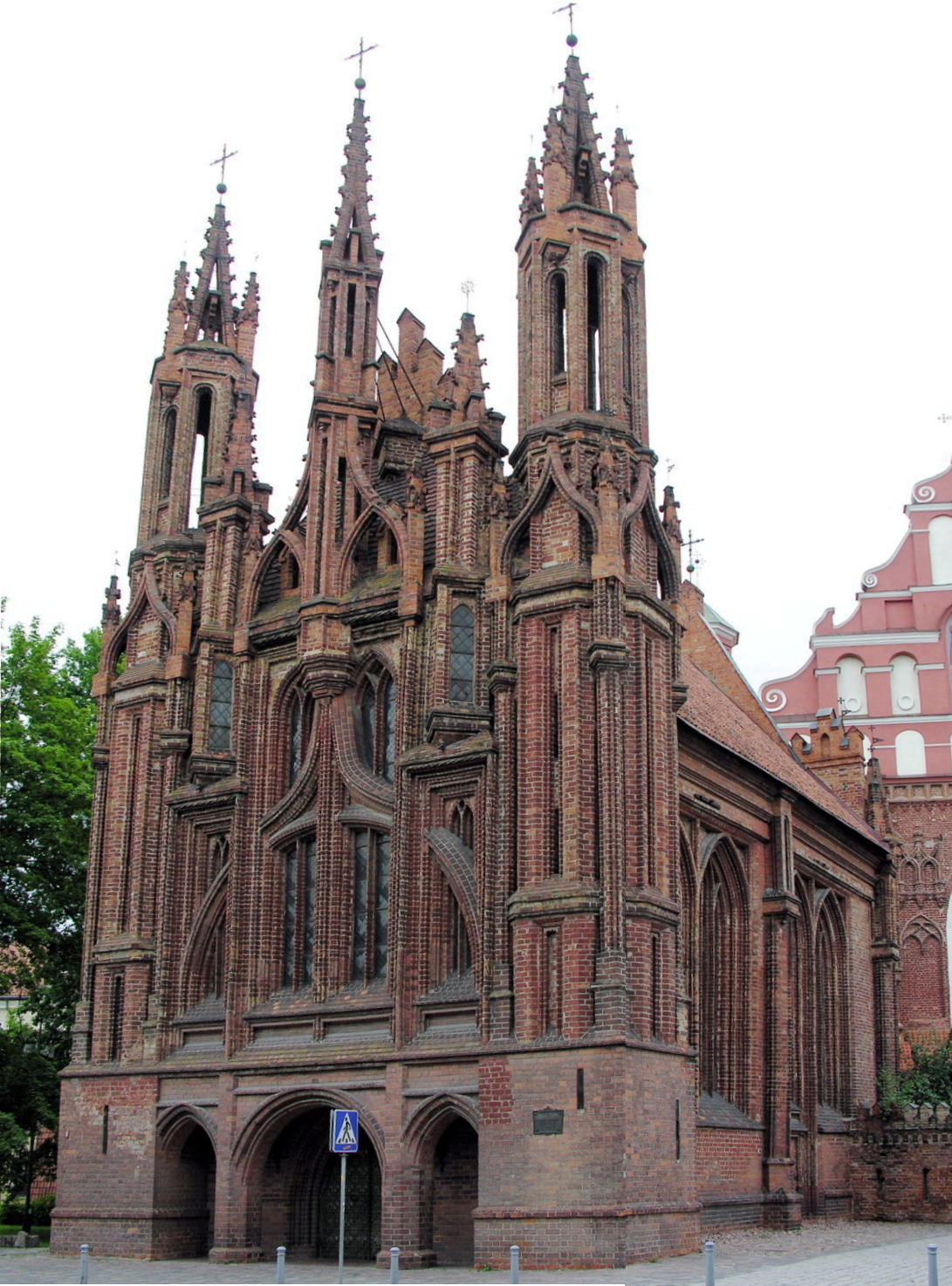 Šv. Onos bažnyčia. Saint Ann's church in Vilnius, Lithuania